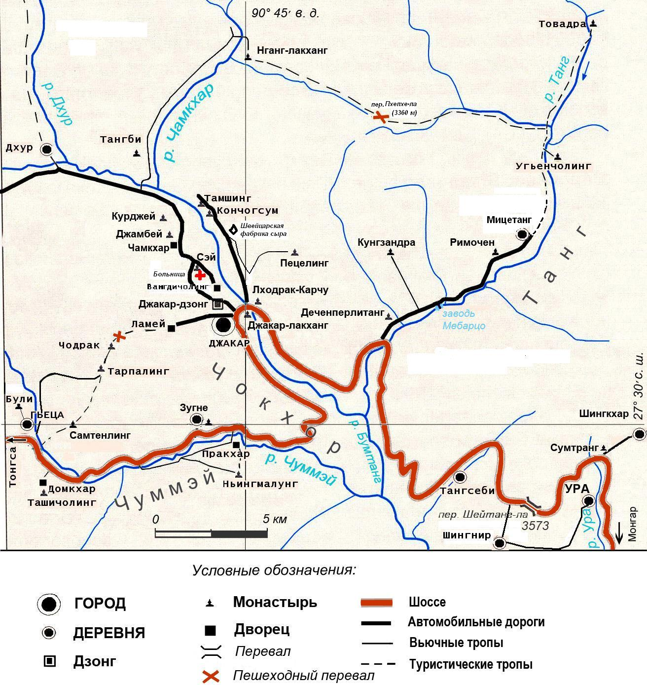 Карта-схема центральной части Бумтанга, Бутан